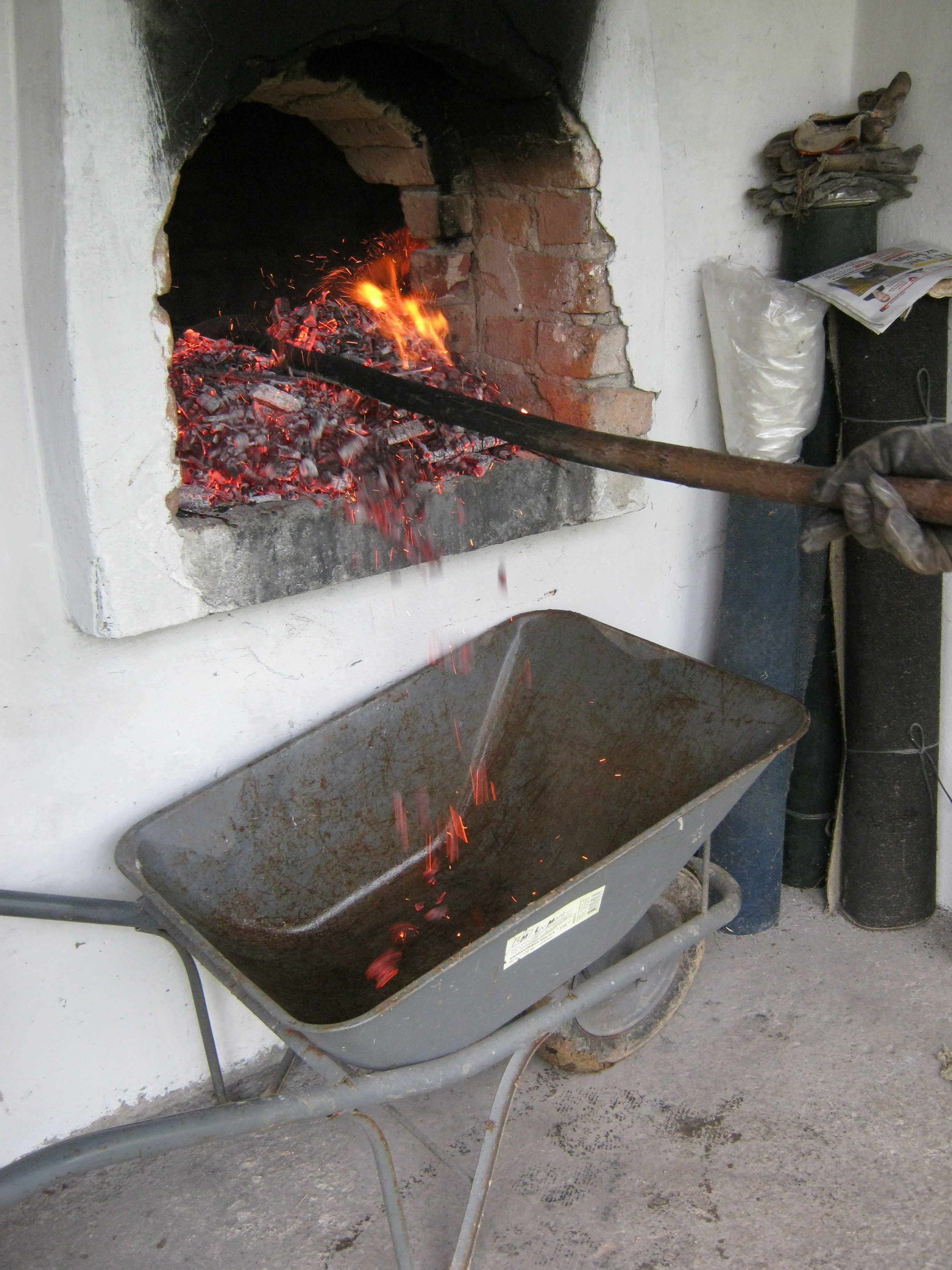 Вађење жара из фуруне.